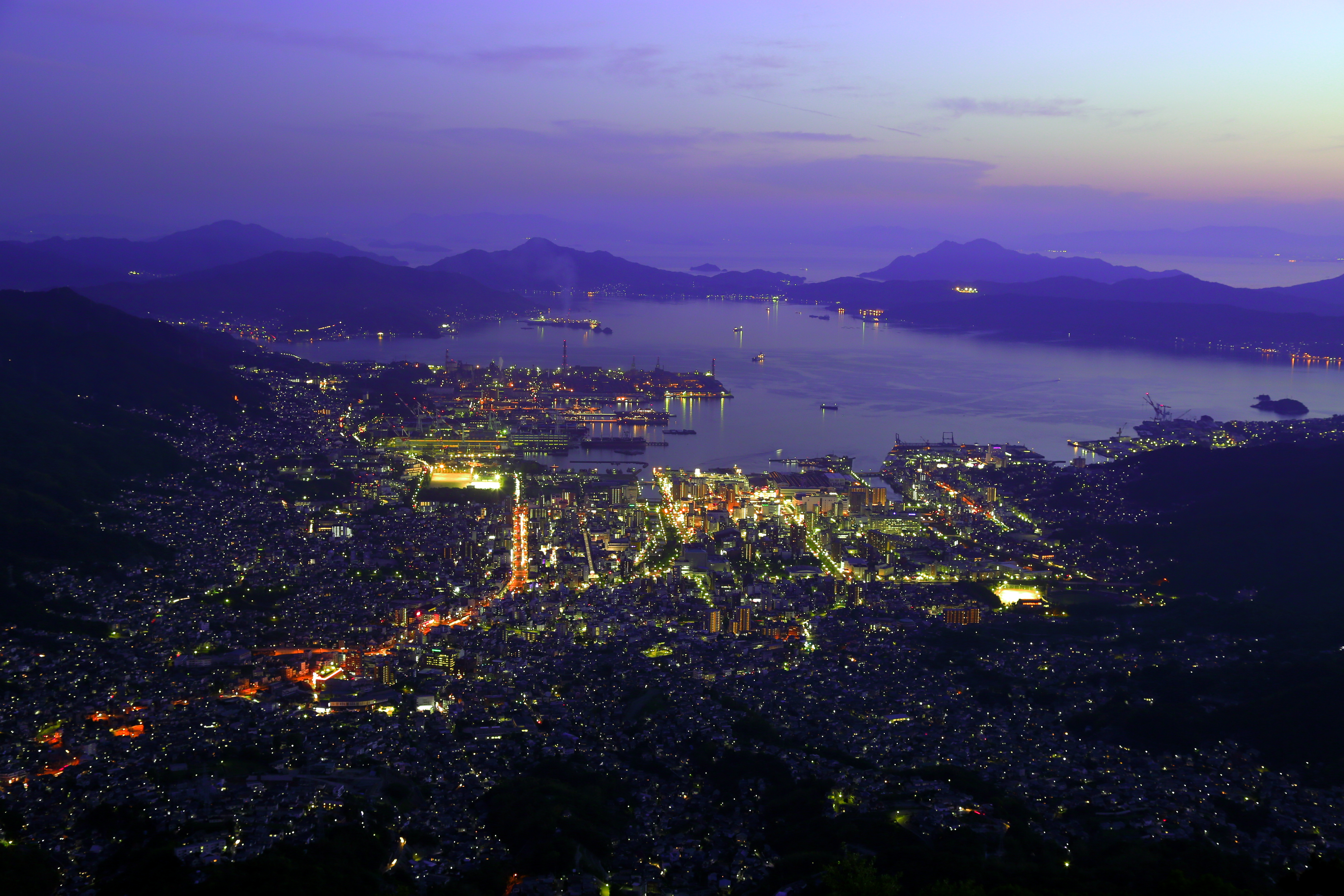 広島県呉市灰ヶ峰の夜景